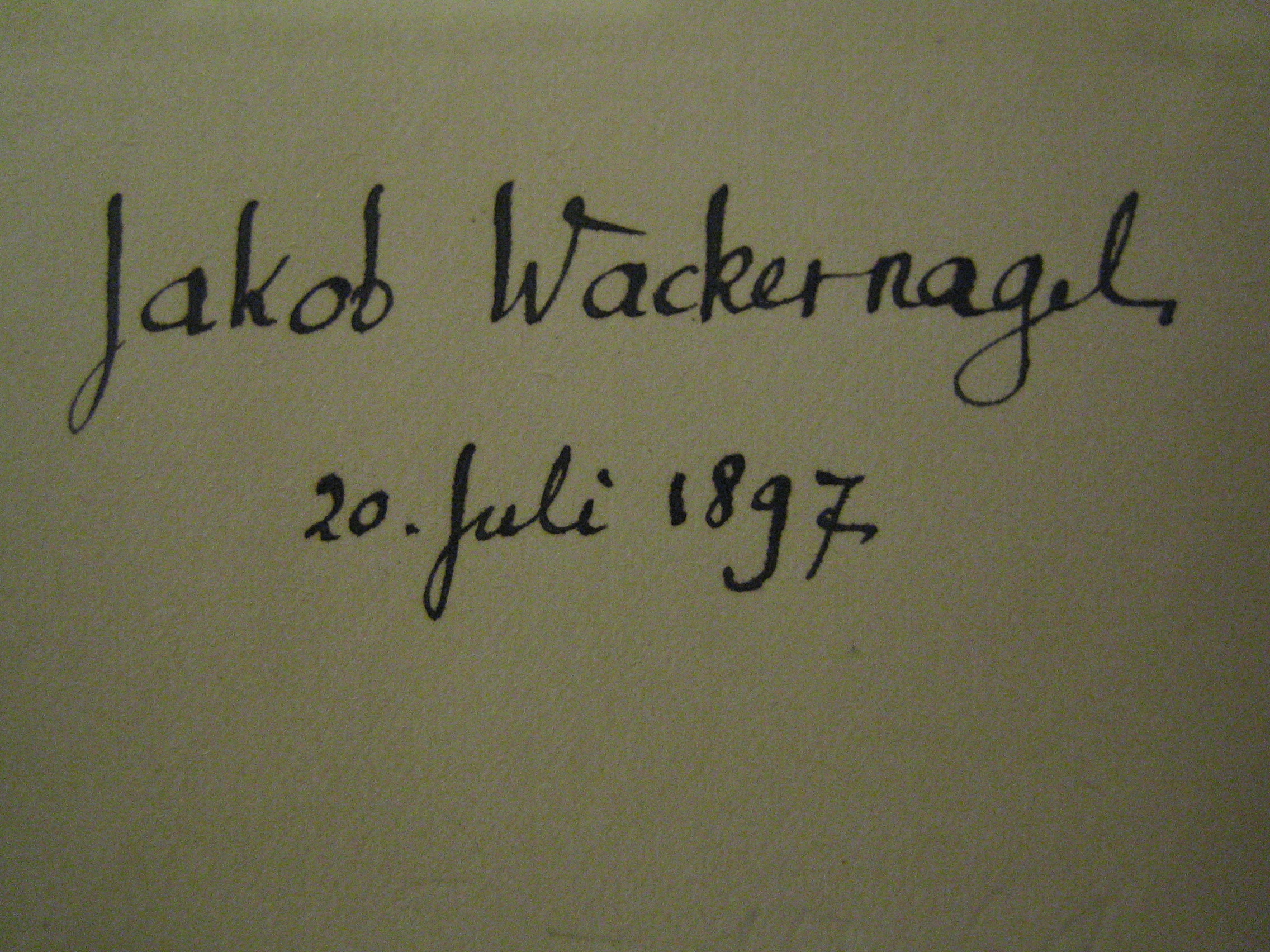 Eigentümervermerk "Jakob Wackernagel 20. Juli 1897"